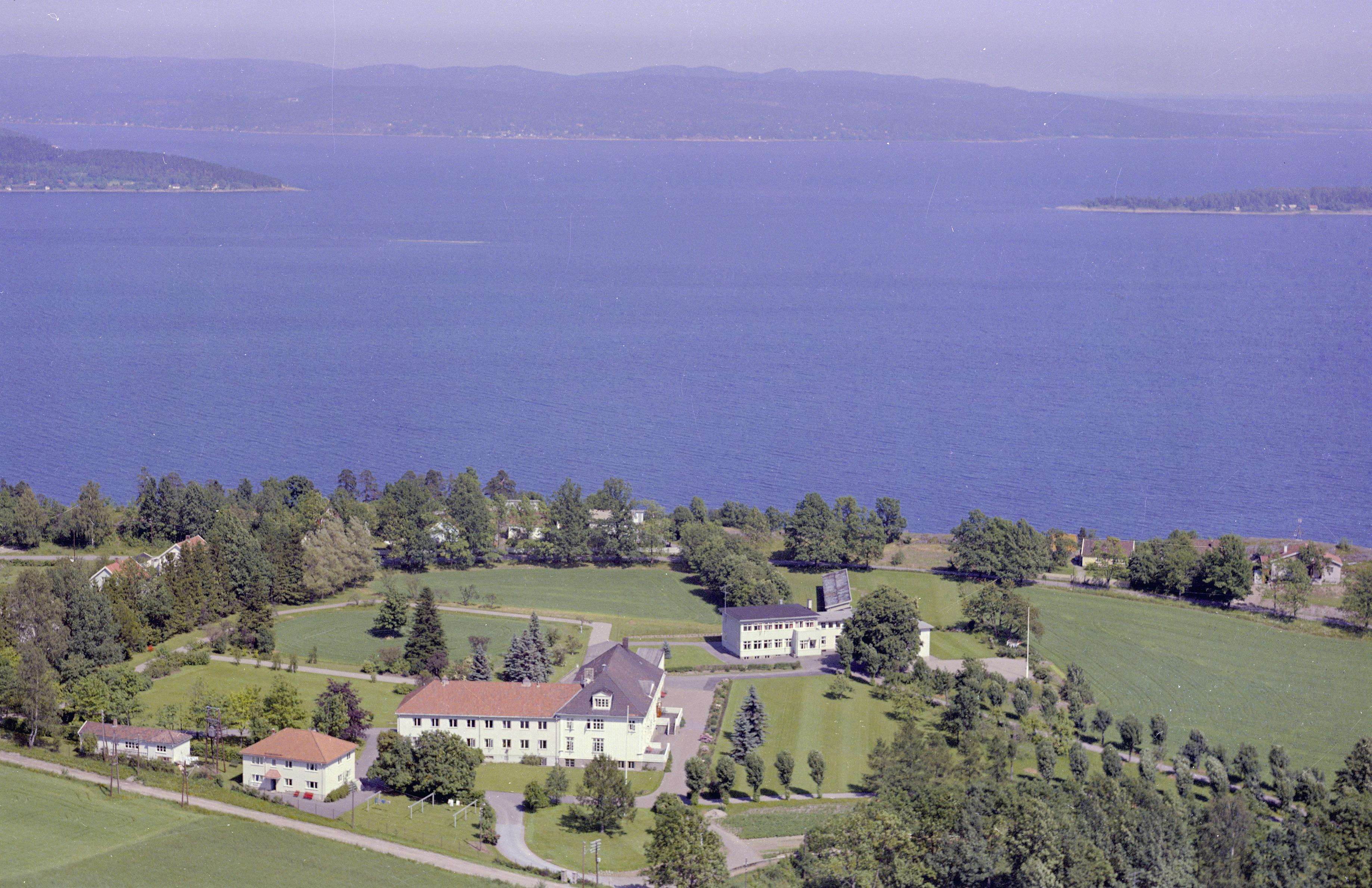 FW.HM.134422 Rove Tuberkulosehjem